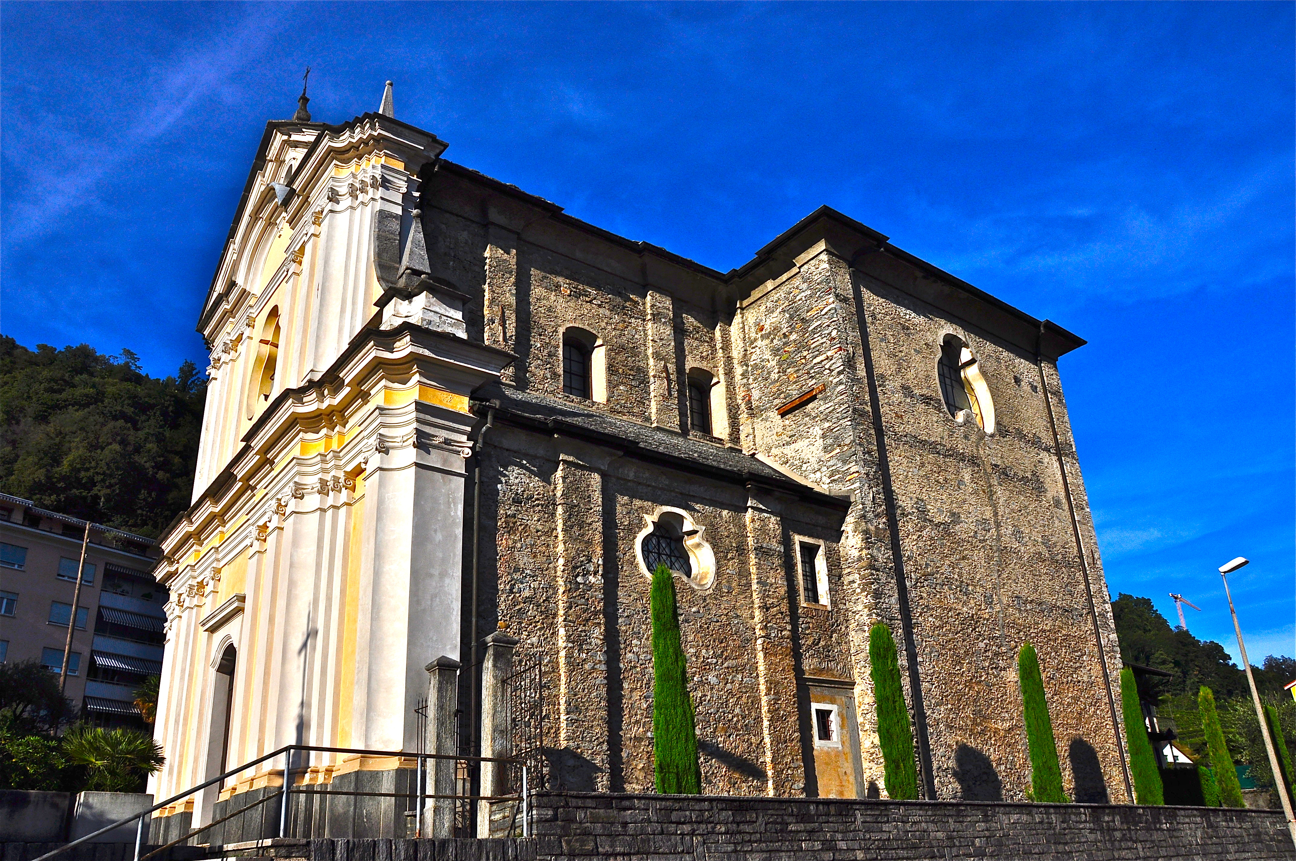 Vista laterale della chiesa di San Giovanni Battista a Locarno (quartiere Solduno)